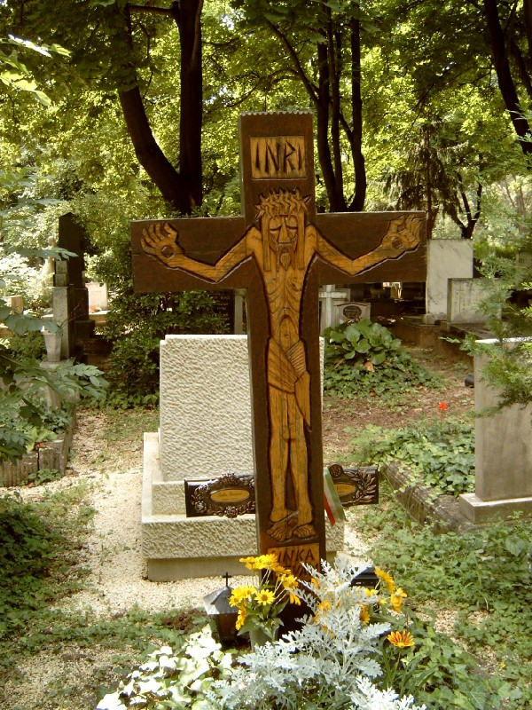 Sinka István sírja Budapesten. Farkasréti temető: 6/7-1-81.